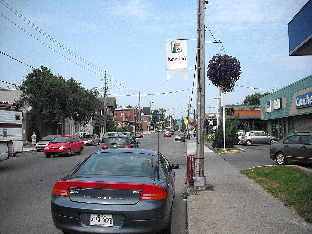 Vue sur le centre-ville de Rawdon, dans Lanaudière, à partir de la rue Queen.